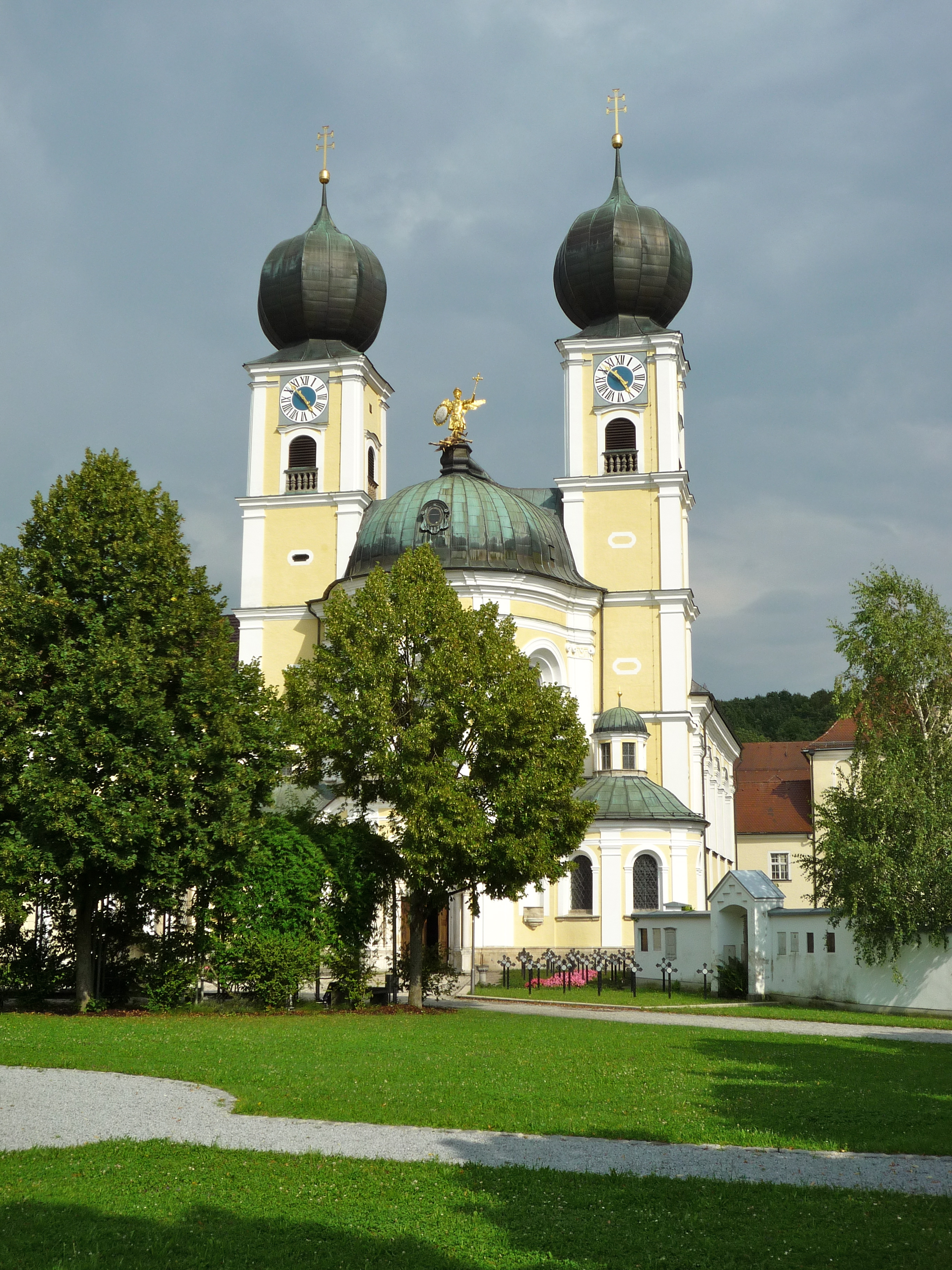 Westfassade der Klosterkirche Metten